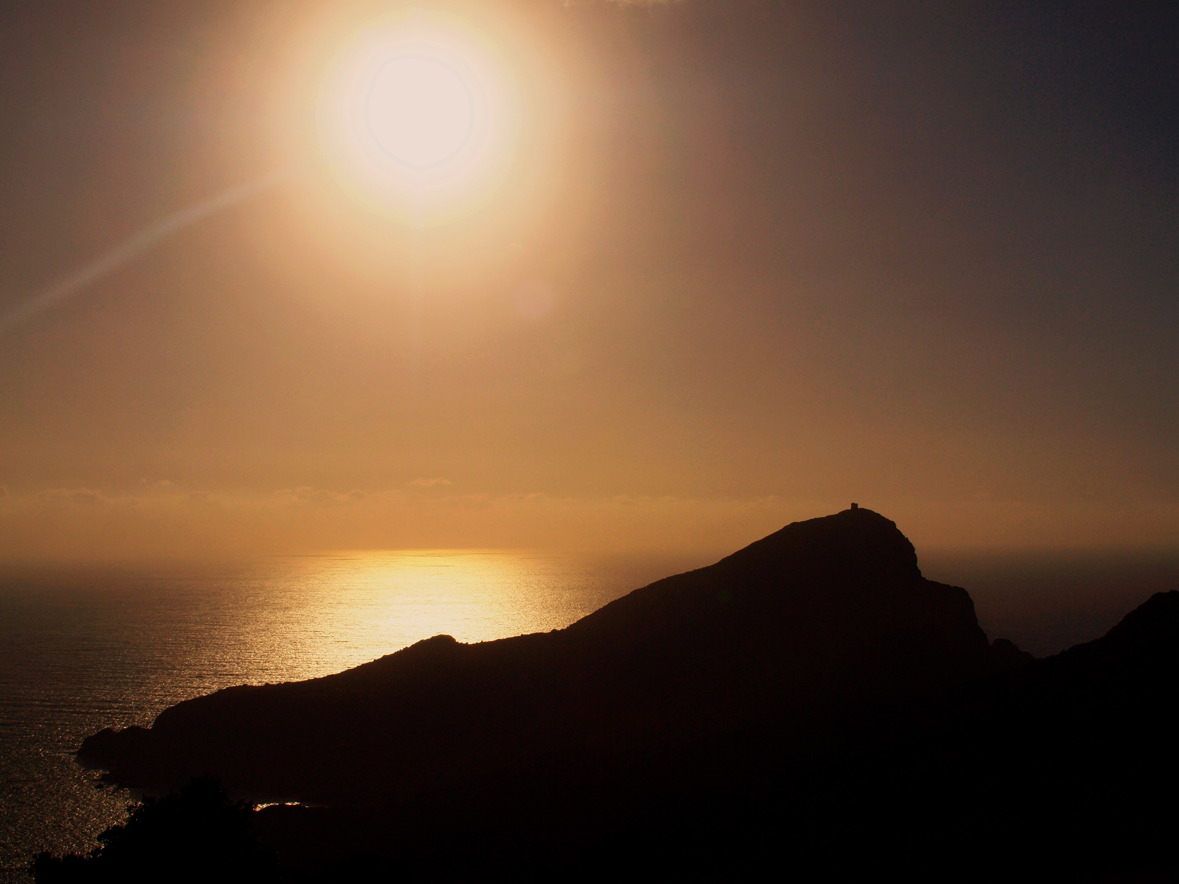 Piana (Corsica) - Coucher de soleil sur Capu Rossu